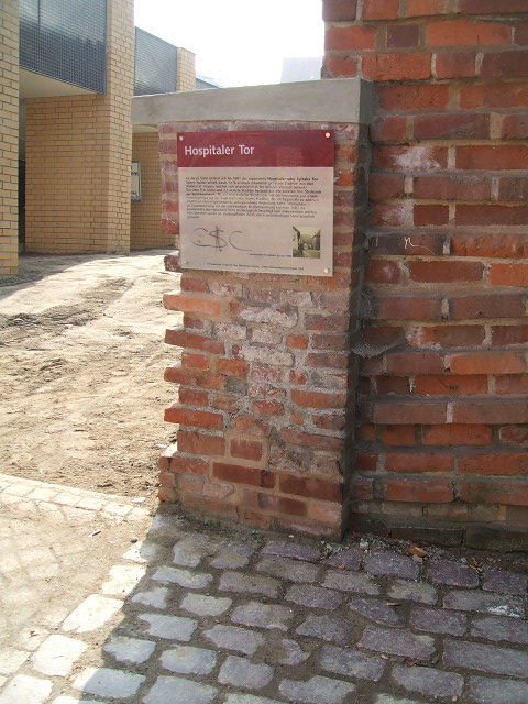 Stralsund,_Germany,_Gedenktafel_Hospitaler_Tor_(2006-09-29)